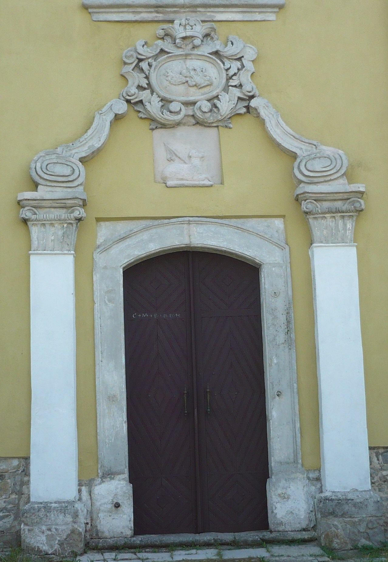 Portal. Kościół ormiański pw. Niepokalanego poczęcia NMP